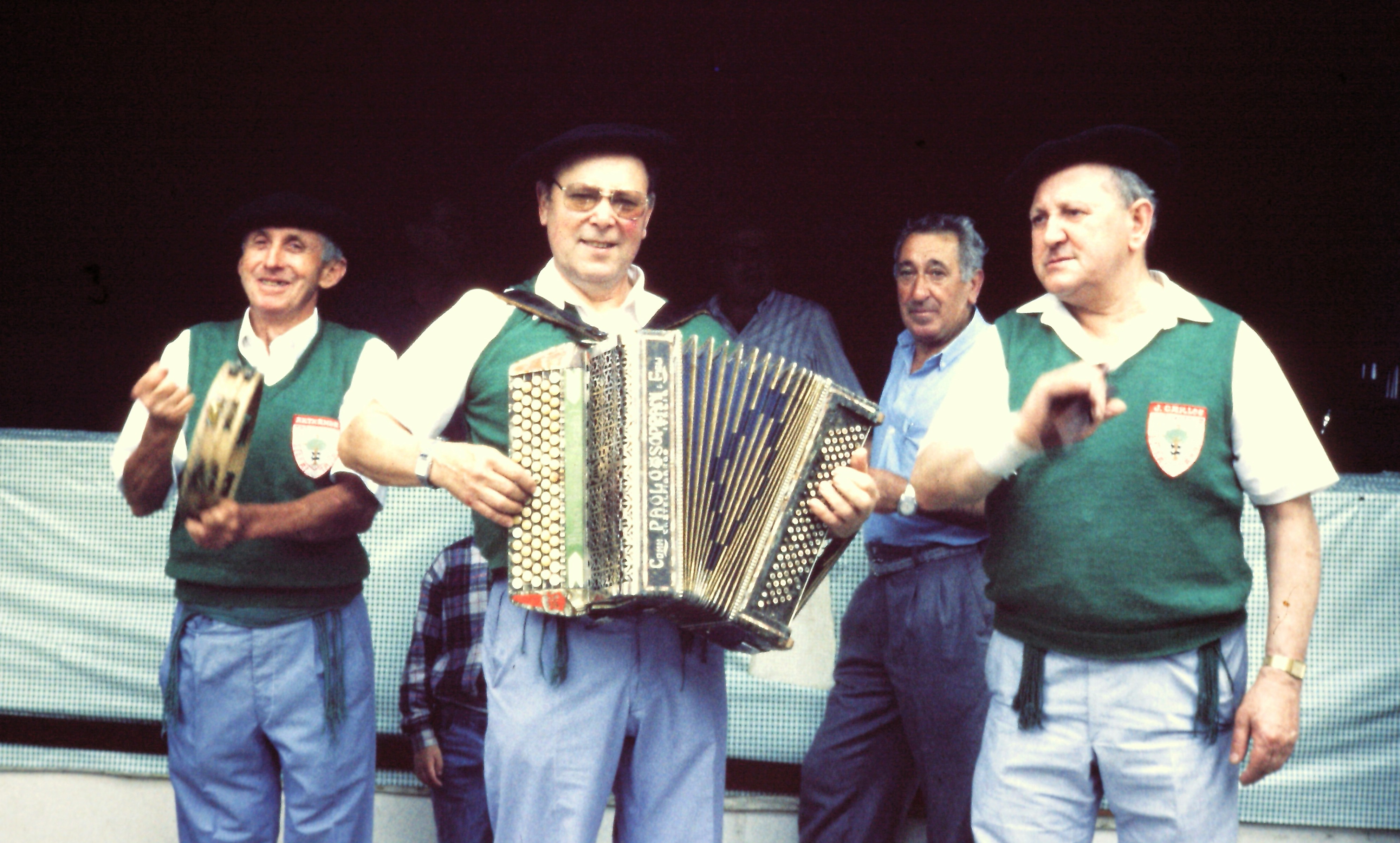 Manolo Legina, Artxanda pandero-jolea eta Juan Carlos Roel 'Tarrañuelas' Begoñan (1980ko hamarraldian, Vicente Martin).